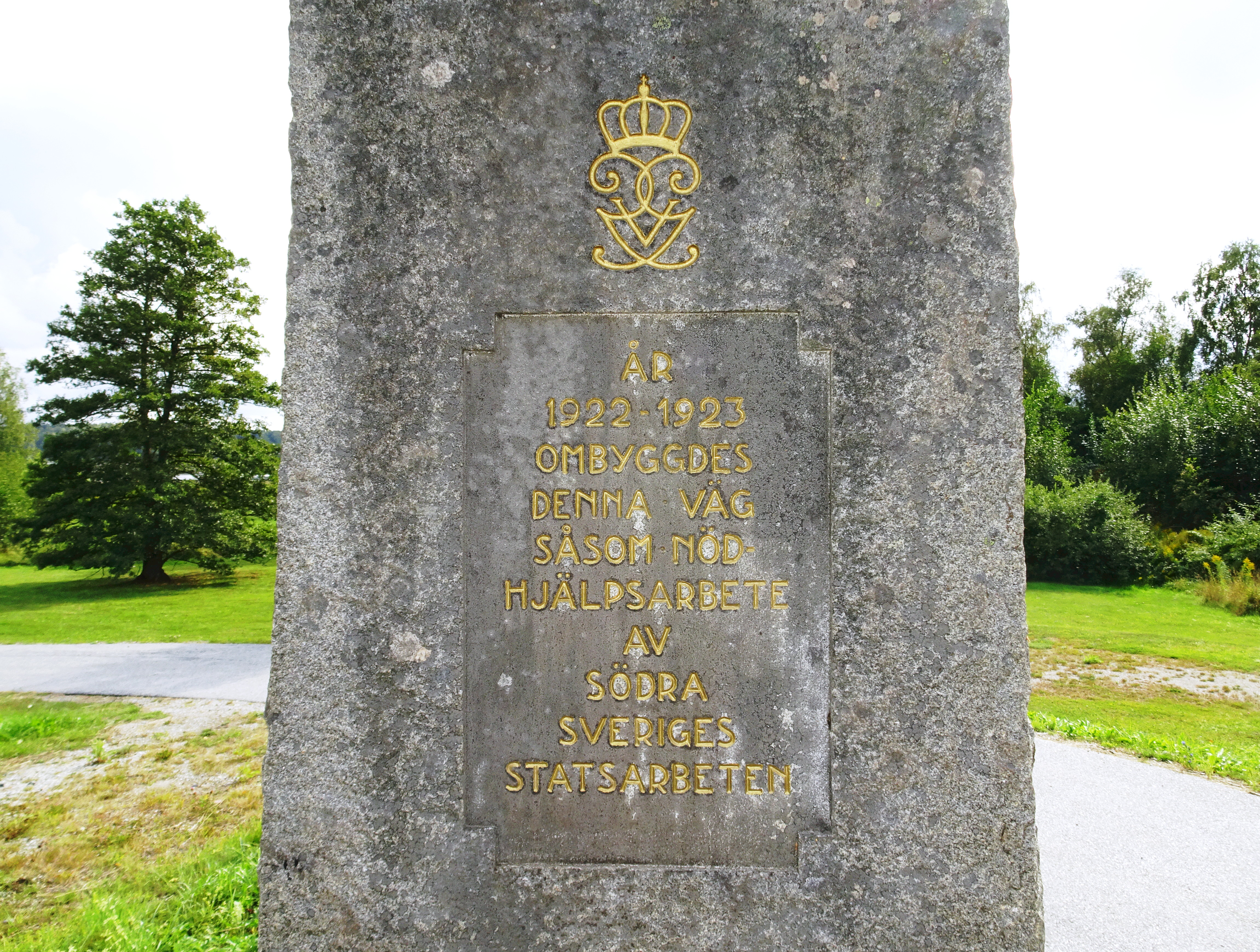 Minnessten över nödhjälpsarbete vid gamla Södertäljevägen i Botkyrka kommun.